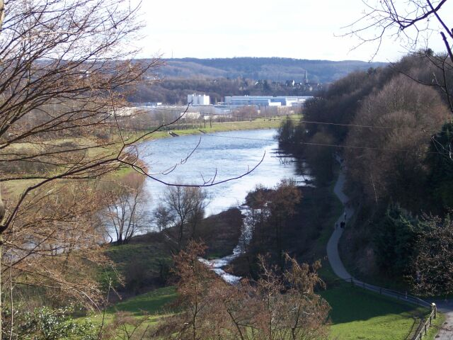 Blick vom nördlichen Ruhrufer (Rauendahlstraße, Hattinger Gemarkung Baak) nach Süden über die Ruhr zum Gewerbe- und Landschaftspark Henrichshütte und zur Hattingener Kernstadt